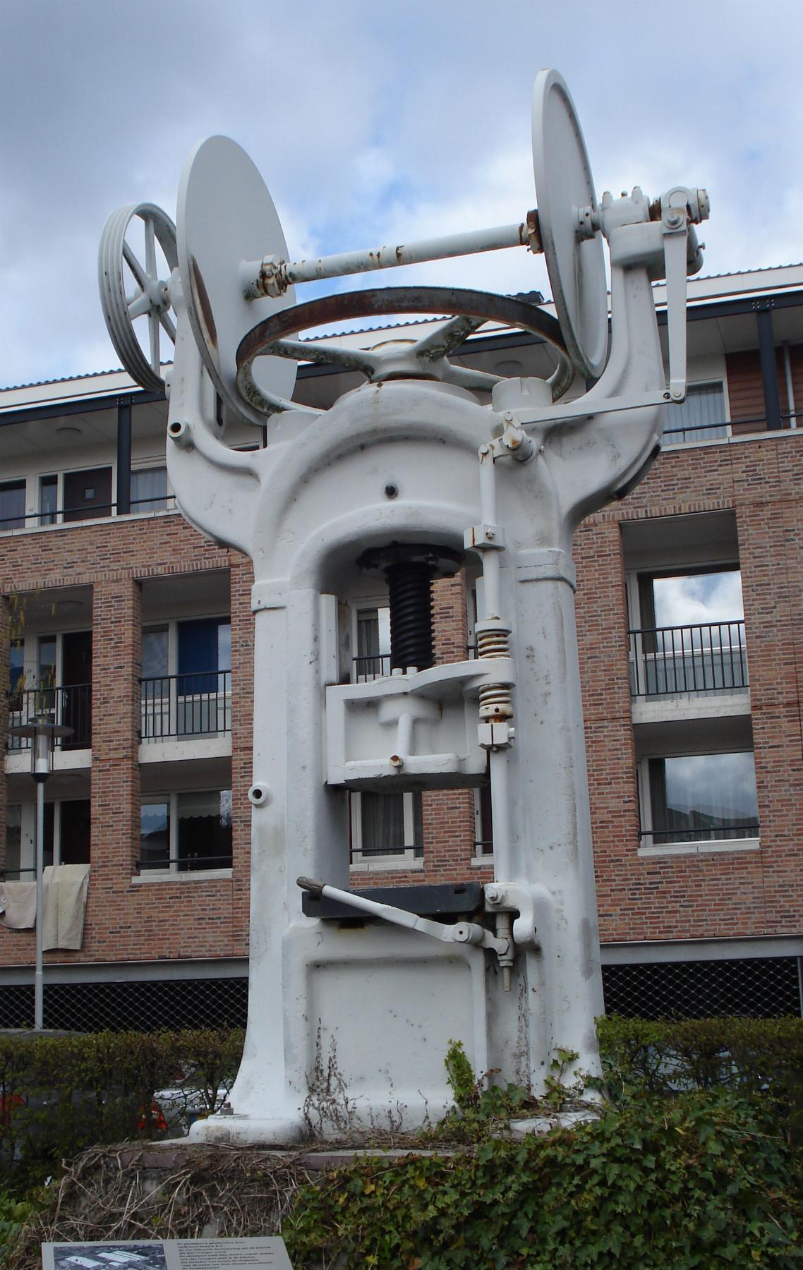 De Plaatpers is een blijvende herinnering aan de fabriek van Spijkstaal die van 1938 tot 2010 op deze plek stond. Spijkstaal produceerde er elektrische voertuigen voor het vervoer van goederen en personen en maakte daarbij gebruik van deze plaatpers. Het monument staat aan de Vlietstraat in Spijkenisse. The photographical reproduction of this work is covered under the article 18 of the Dutch copyright law, which states that “it is not an infringement of copyright to reproduce and publish pictures of a work, as meant in article 10, first paragraph, under 6°[1] or of an architectural work as meant in article 10, first paragraph, under 8°[2], which are made to be permanently located in a public place, as long as the work is depicted as it is located in the public space. Where incorporation of a work in a compilation is concerned, not more than a few of the works of the same author may be included”. [1] drawings, paintings, works of architecture and sculpture, lithographs, engravings and the likes [2] drafts, sketches and three-dimensional works relating to architecture, geography, topography or other sciences Note that photographs are not included in Item 6. They are separately listed at Item 9 and are therefore not covered by FOP. See COM:CRT/Netherlands#Freedom of panorama for more information.